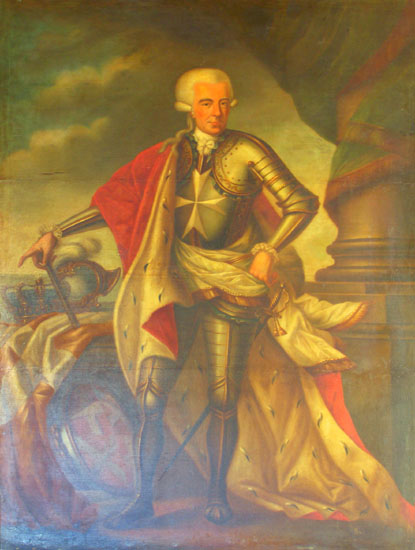 Portrait of Ferdinand von Hompesch zu Bolheim (1744-1805)